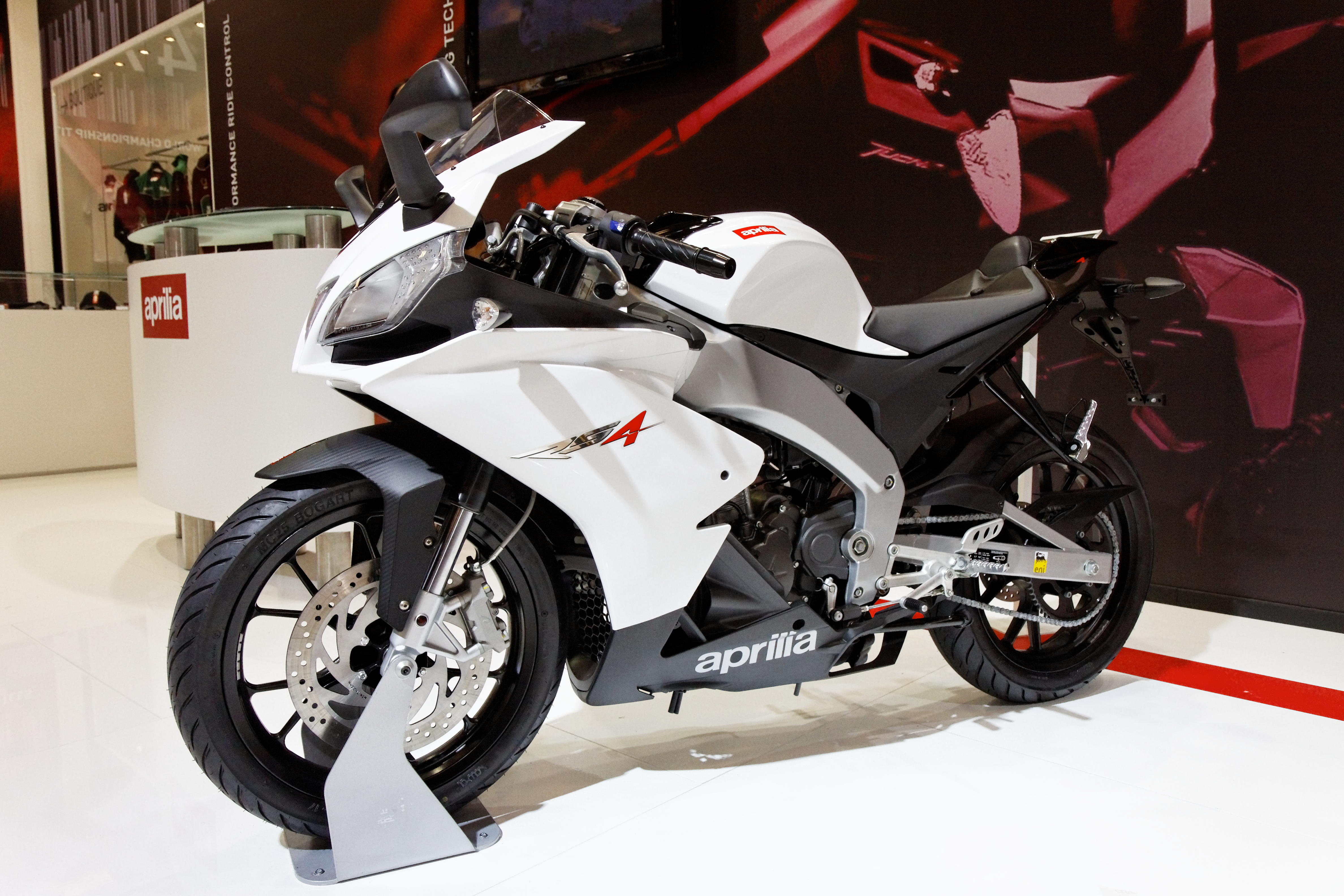 Aprilia - RS4 125